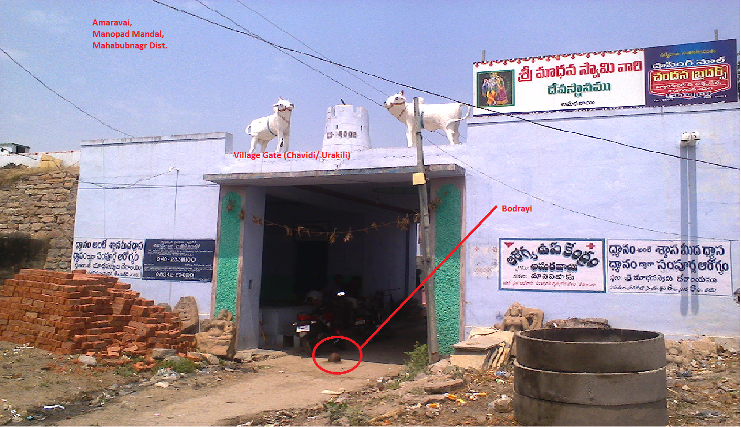 అమరవాయి గ్రామ బొడ్రాయి